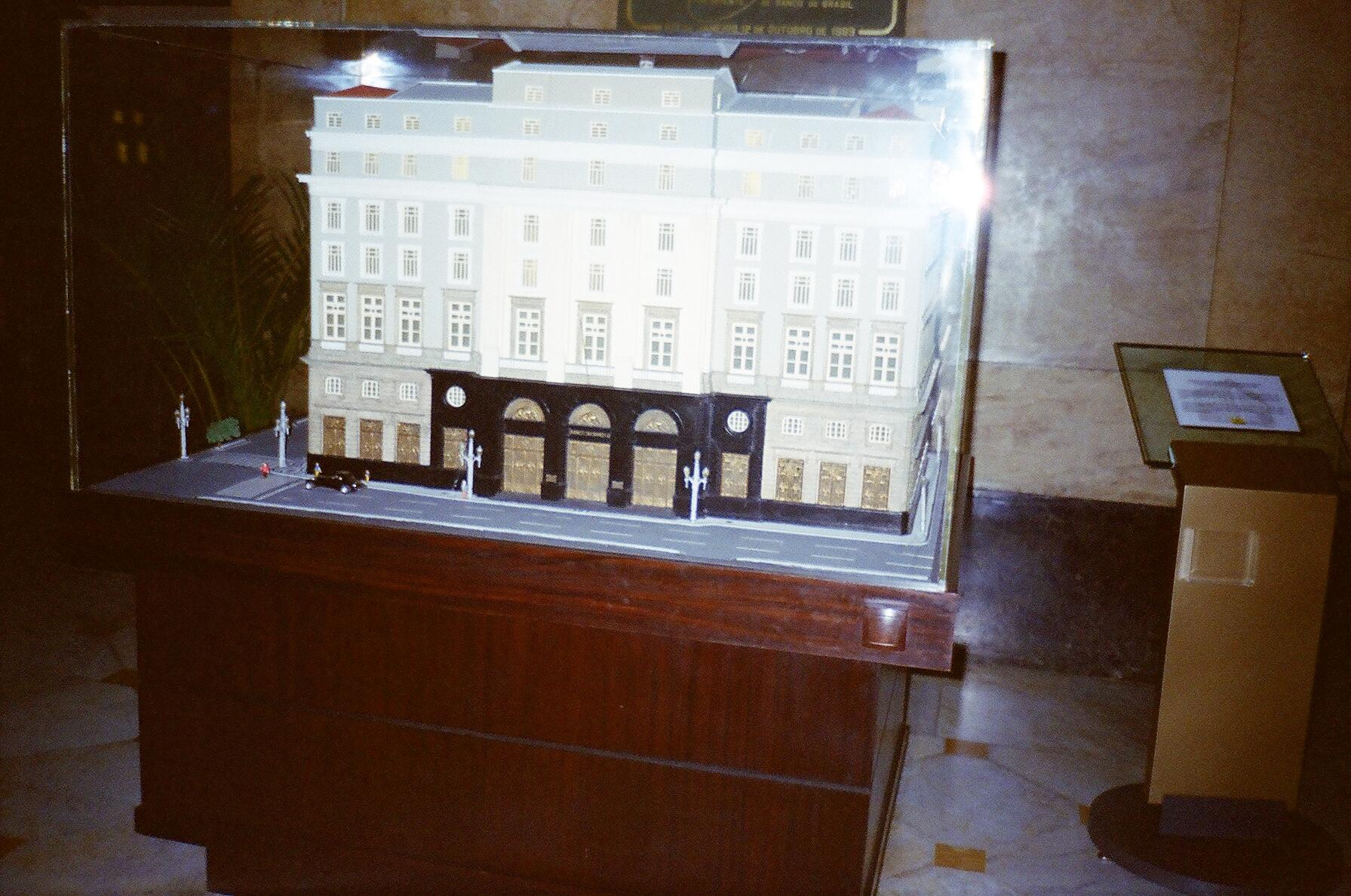 CCBB - Rio (maquete)